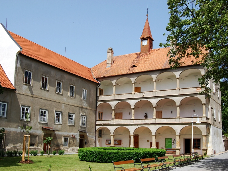 Zámek Bohutice, náves, Bohutice